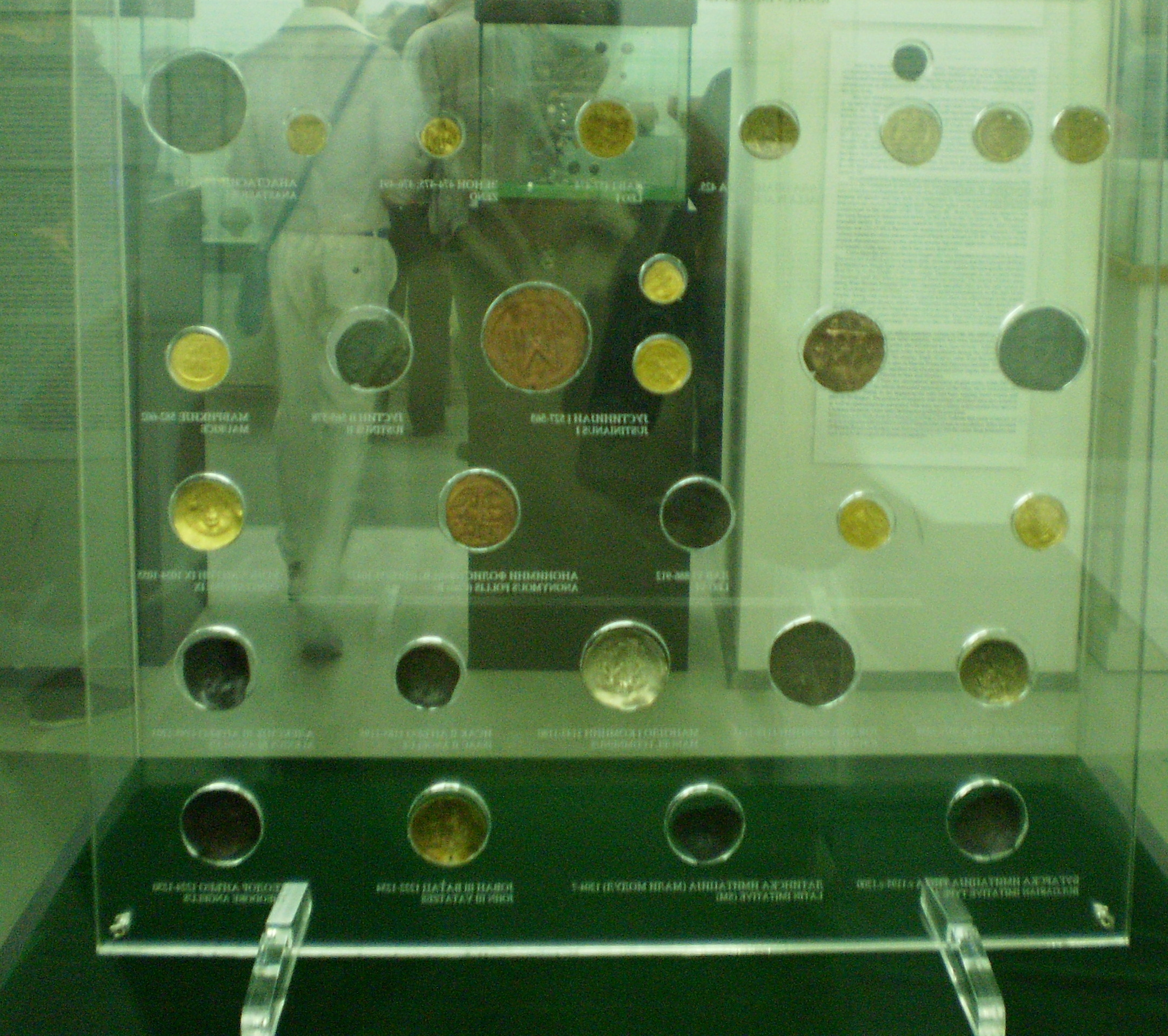 Srpski (latinica): Prilikom arheoloških istraživanja na Medijani 1961. otkrivena je ostava kasnorimskog novca, sa 227 primeraka rimskog bronzanog novca iz 4. i 5. veka. Najstariji novac nađen u ovoj ostavi pripadao je zbirci Konstansovog novci iskovanog u kovanicama u Solunu između 330. i 335. godine. Najmlađi je novac Teodosija II iskovan između 425. i 450. godine u Kiziku u Maloj Aziji. Na otkrivenim kovanicama zastupljeni su sledeći vladari: Konstantnin Veliki, Konstancije II, Konstans, Julije Cezar, Valentinijan I, Valens, Gracijan, Valentinijan II, Teodosije I i njegova žena Flacila, Arkadije, Magnus Maksimus, Honorije i Teodosije II. Otkriven novac na Medijani kovan je u kovnicama u Solunu, Konstantinopolju, Kiziku i Nikomediji u Maloj Aziji, Herakleji, Siscija - čiji su komadi u zbirci najbrojniji. Kovanice drugih vladara zastupljene su samo u pojedinačnim primercima.